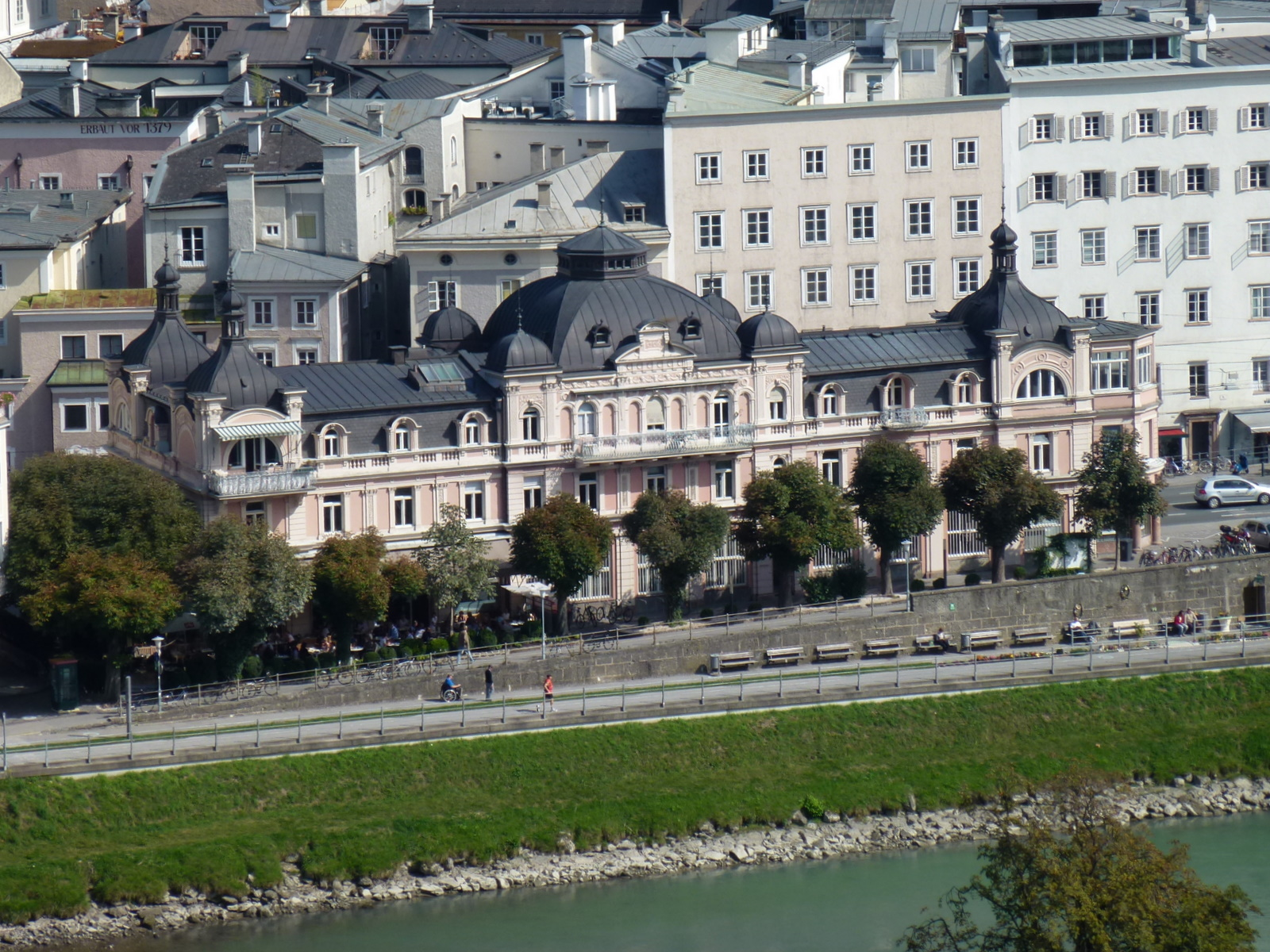 Miethaus, sog. Bazar-Gebäude. Salzburg